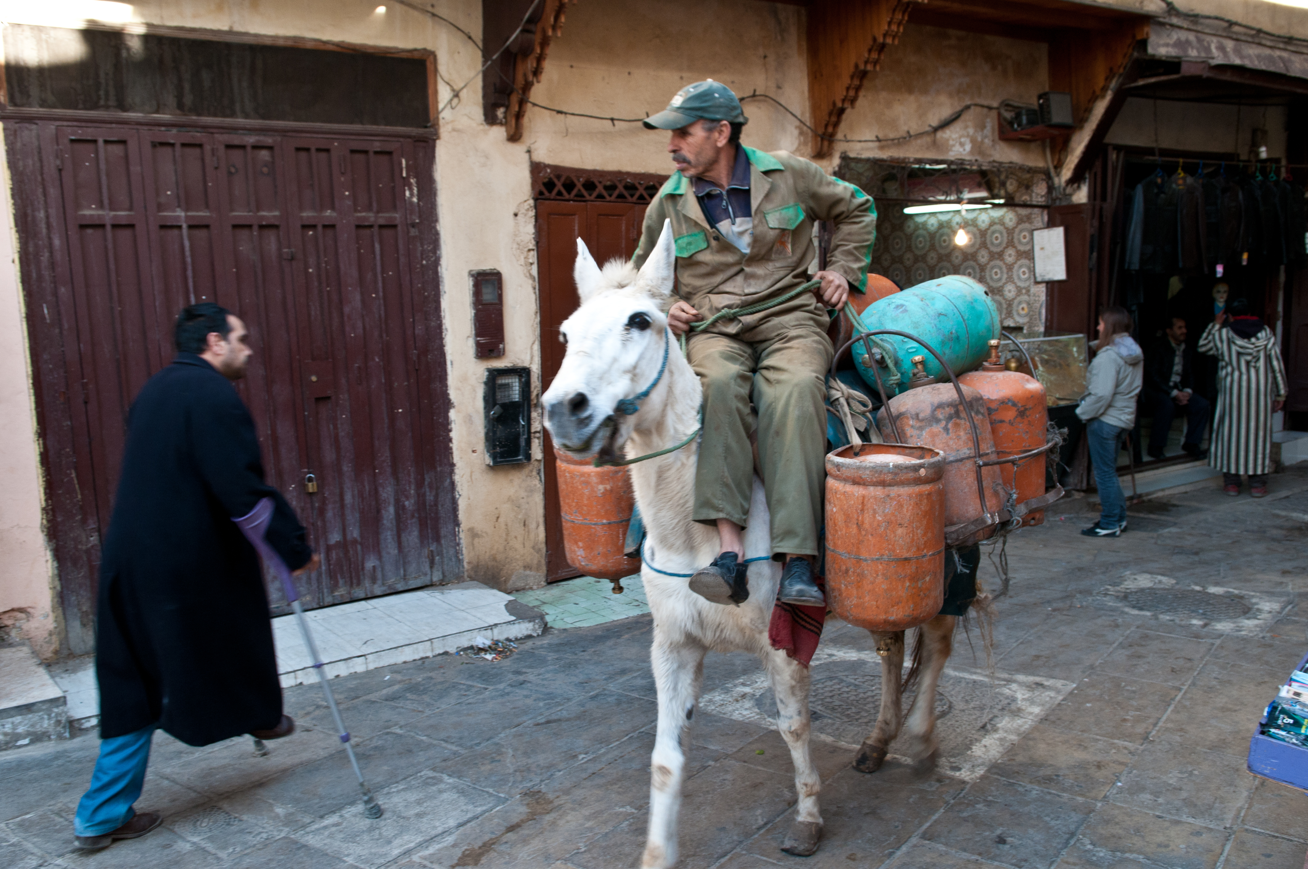 Fes